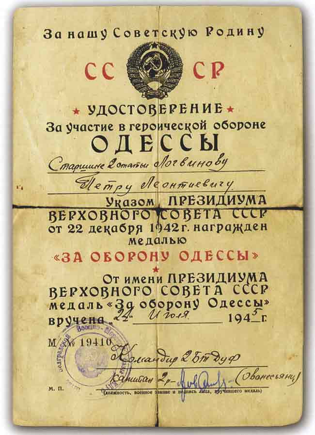 Наградное удостоверение к медали «За оборону Одессы»Официальный документ к медали